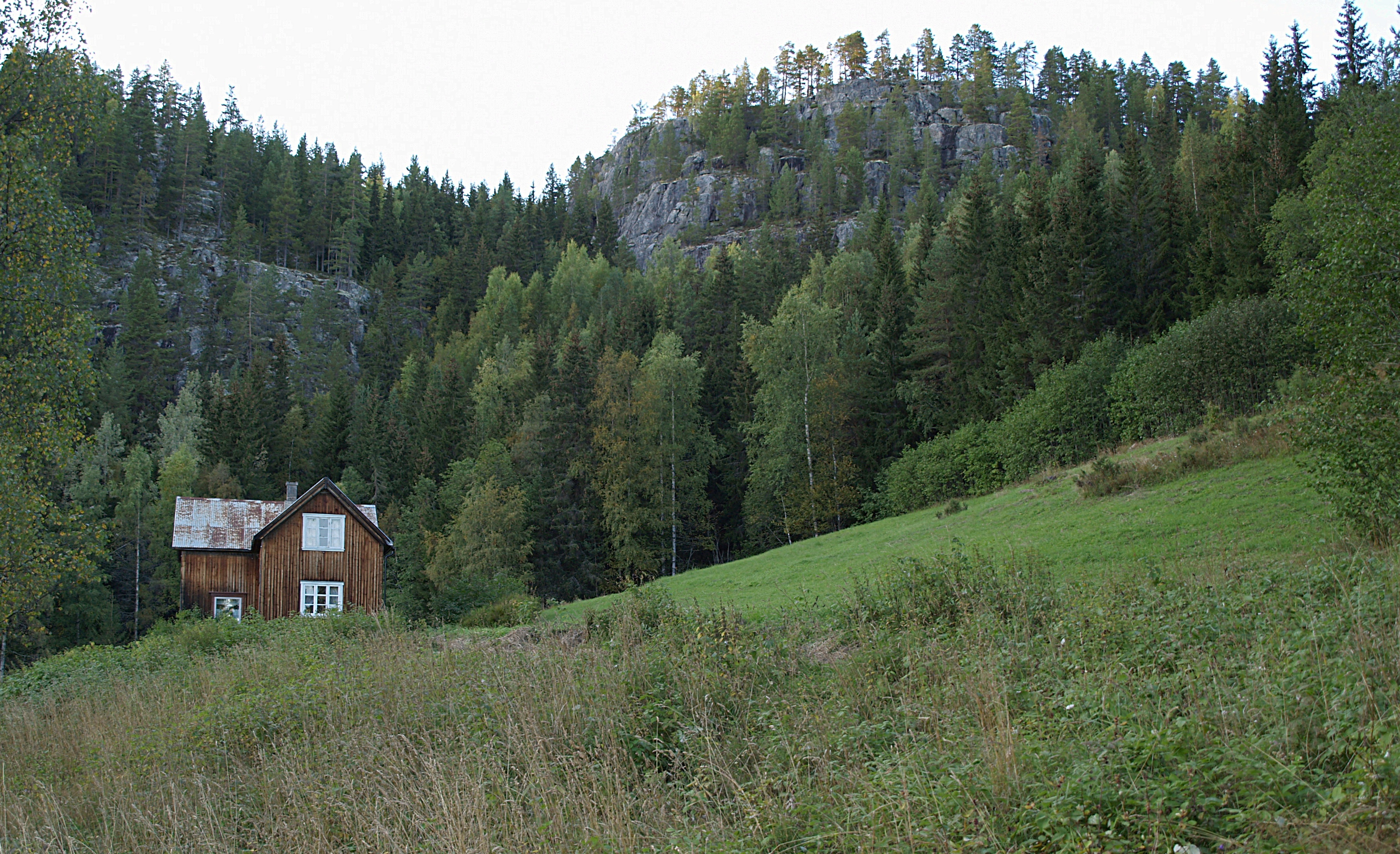 Bjørneskardet farm in Sør-Aurdal, see also Skiløperpatruljen i Mørkedalen